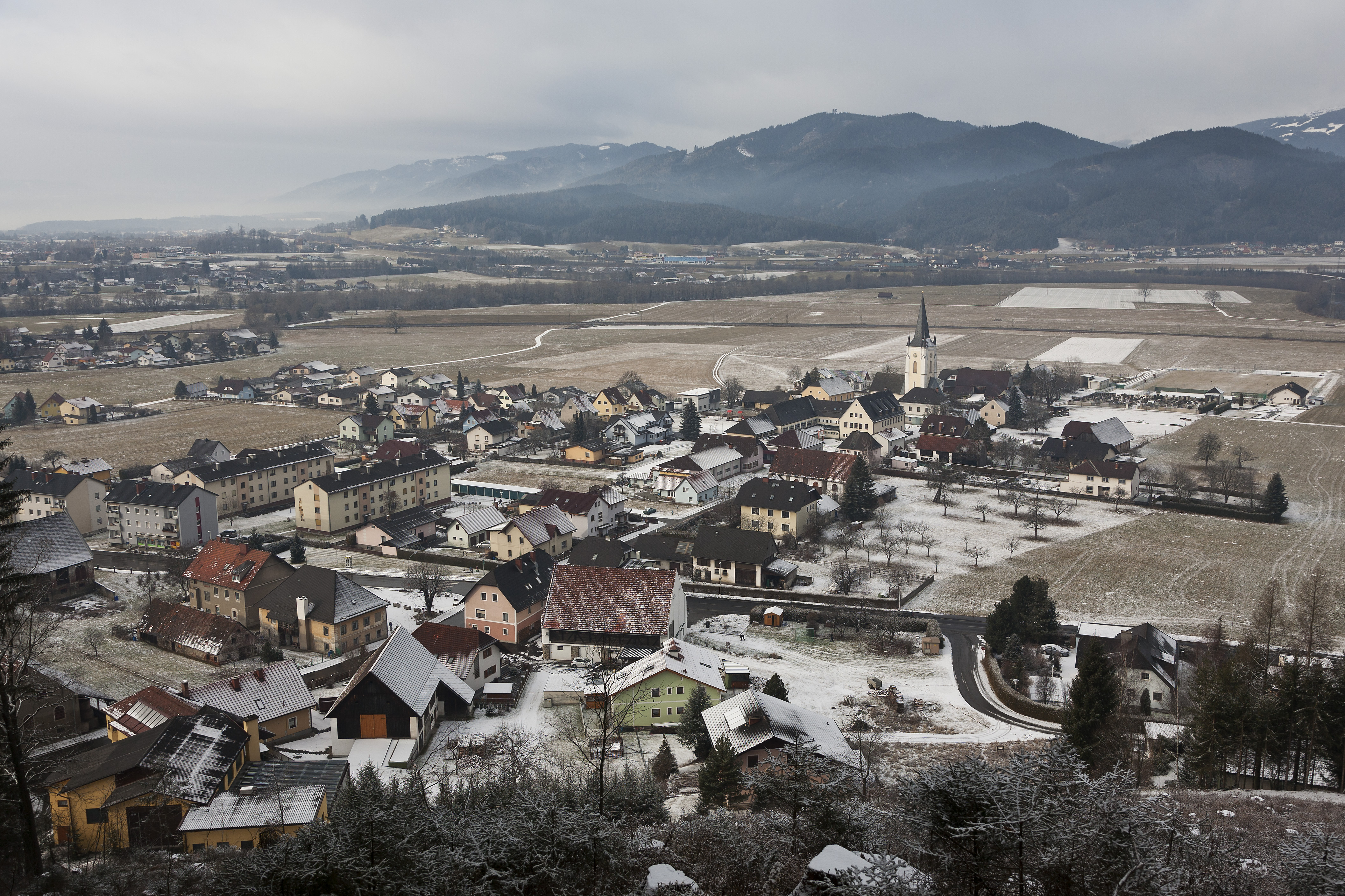 Blick vom Kalvarienberg auf Sankt Margarethen